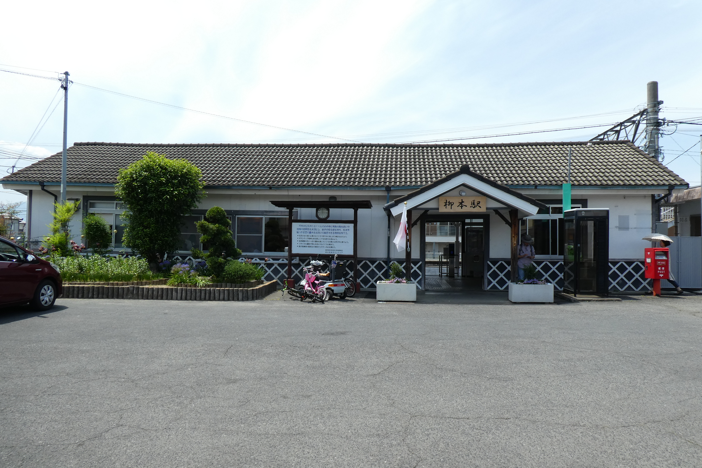 JR桜井線柳本駅。駅舎。